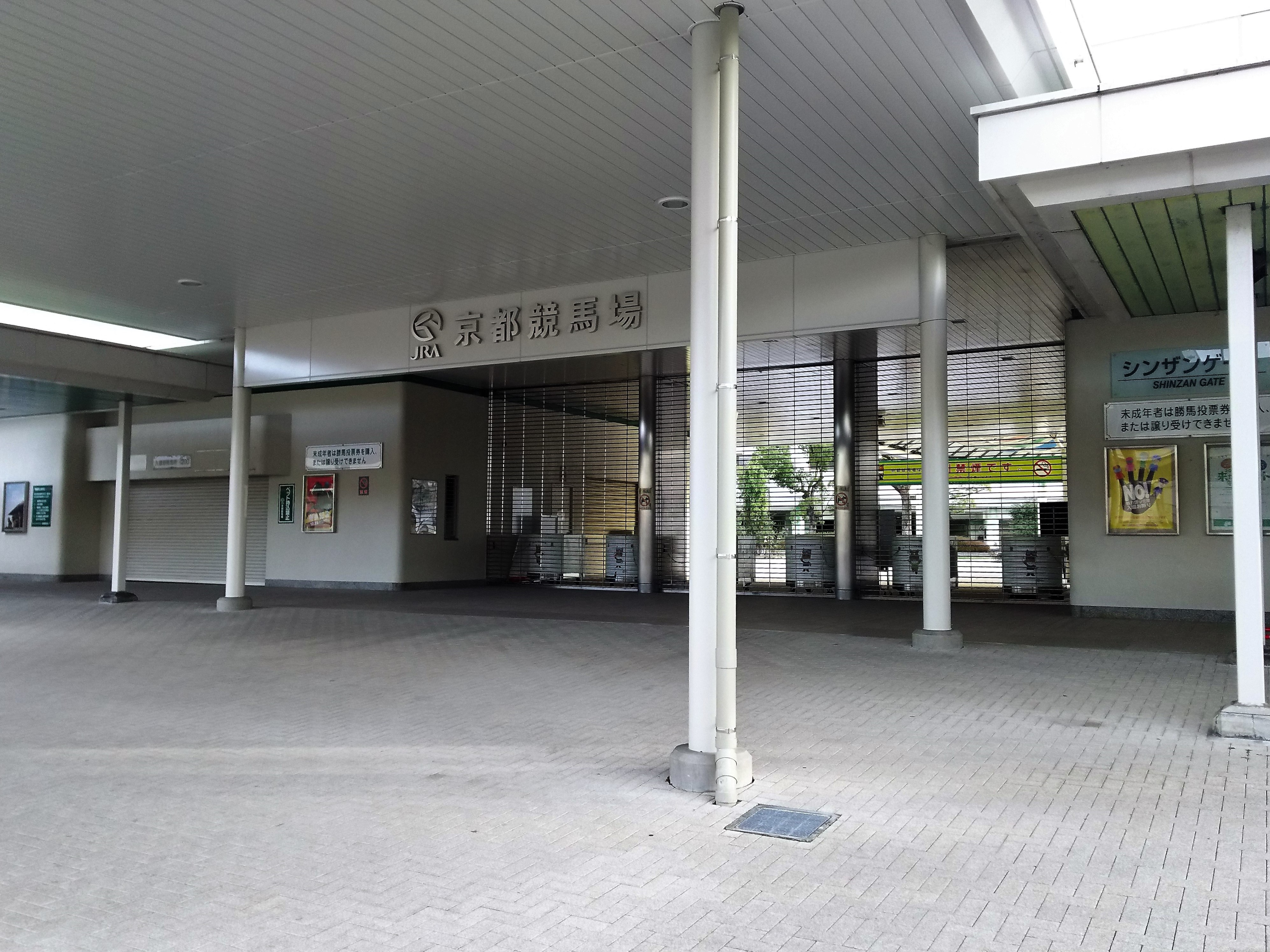 京都競馬場シンザンゲート（京都市伏見区）